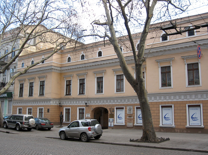 Pushkin museum in Odessa